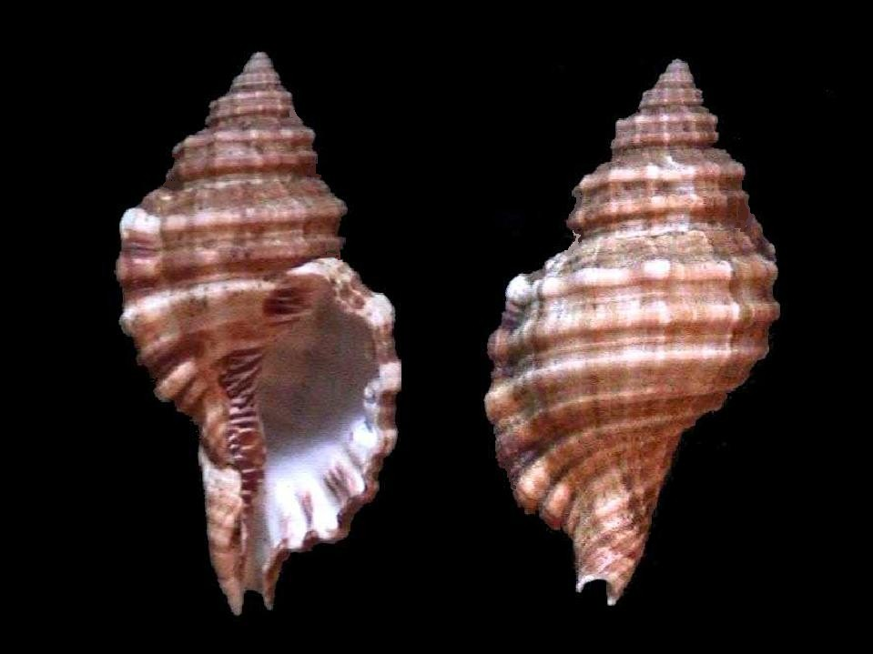 Cymathium femeorale, del Archipiélago Los Roques, Dependencias Federales - Venezuela.